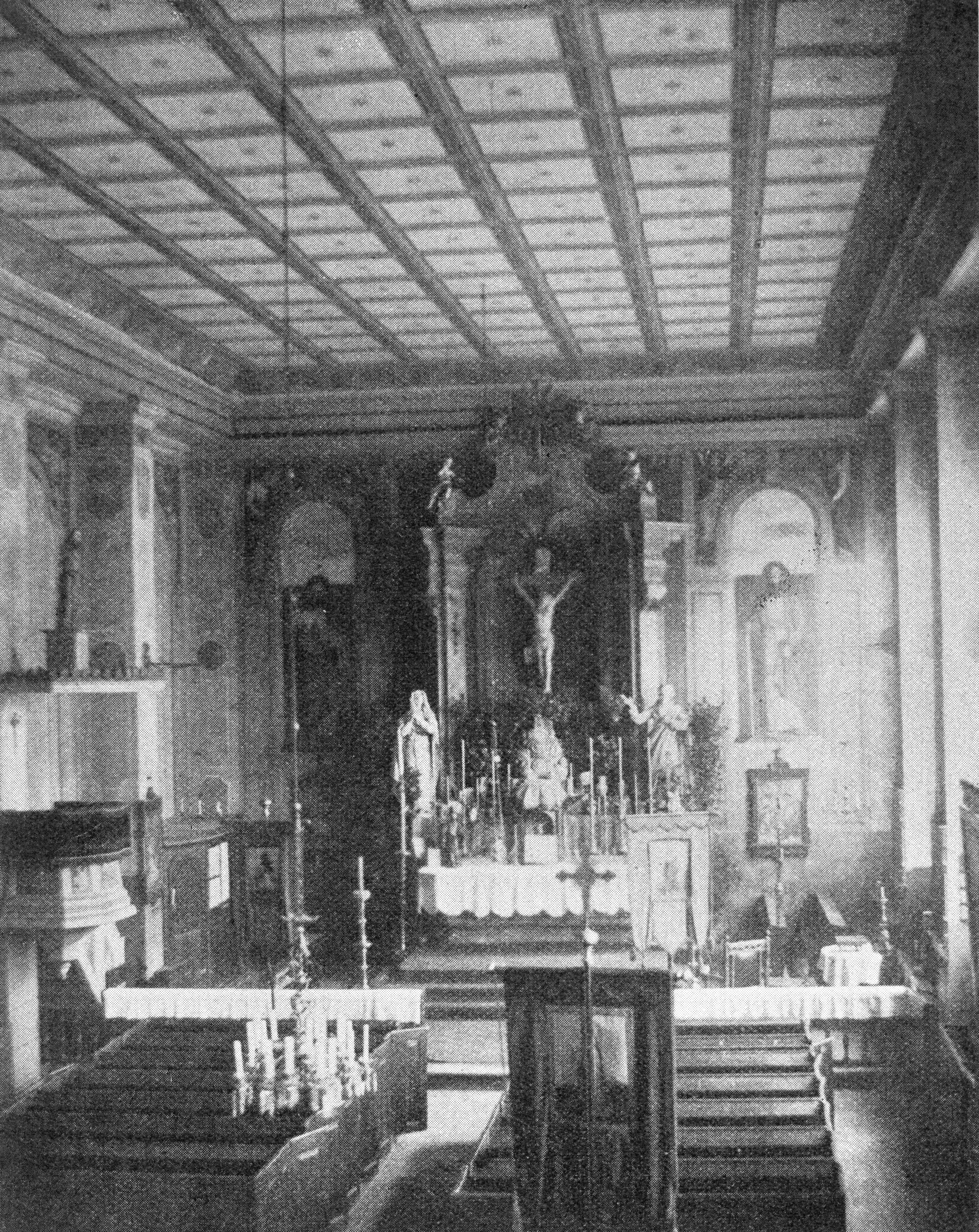 Abb. 67. Kirche zum Heiligen Kreuz und zur Heiligen Rosenkranzkönigin. Inneres der alten Kirche (nach einer Aufnahme im Besitze des Herrn Rechnungsrates Reschke in Frankfurt a. O.)